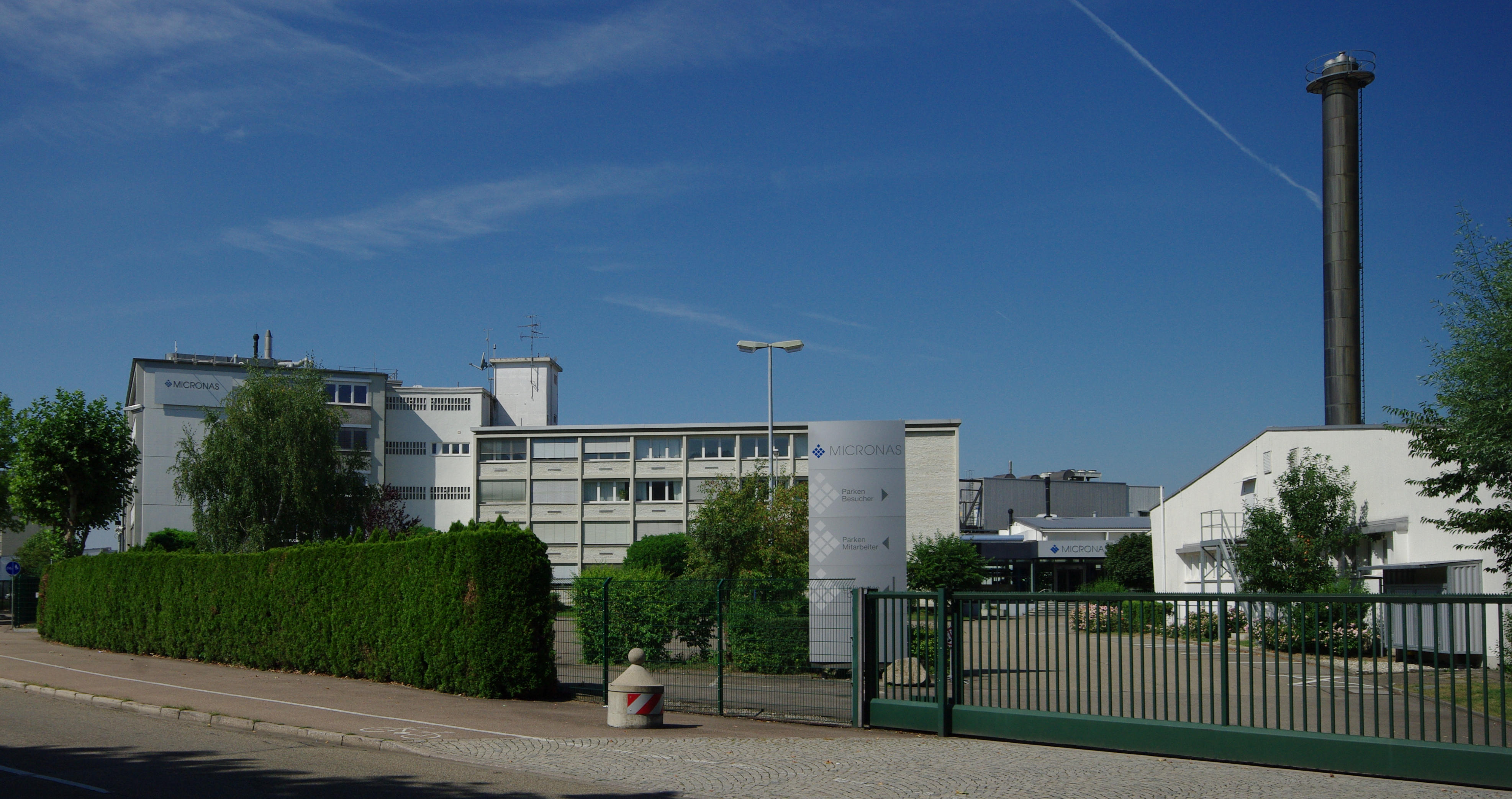 Micronas Werk in Freiburg